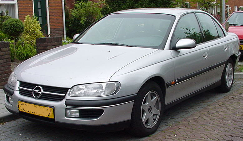 Opel Omega Sedan 1997